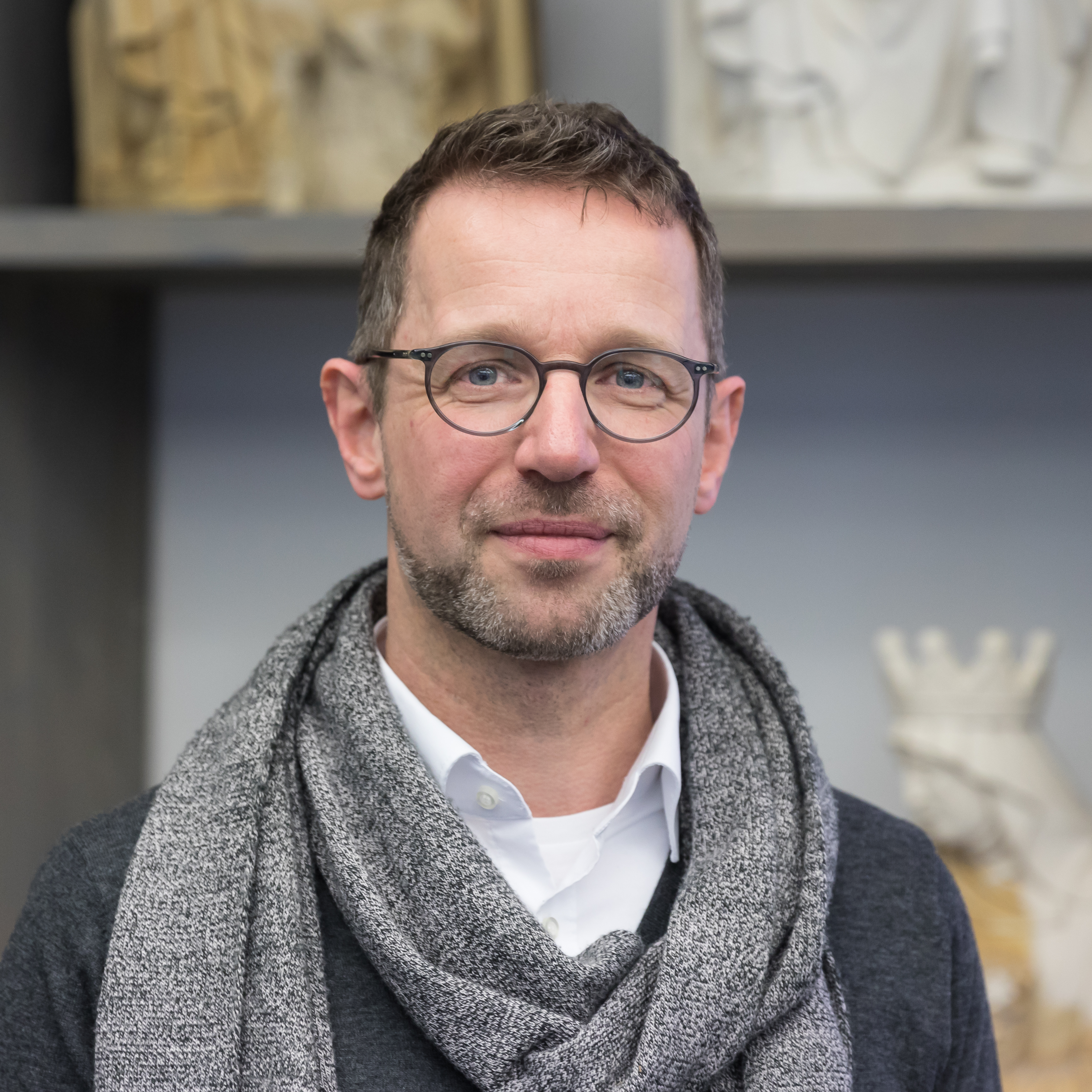 Peter Füssenich in der Steinrestaurierungswerkstatt der Kölner Dombauhütte